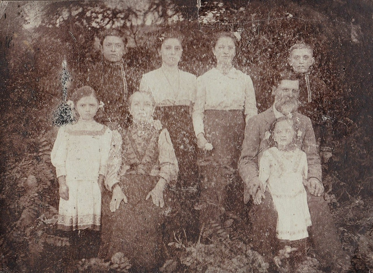 Семья однодворца Г. И. Бухтиярова (1866 г.р.) из с. Луковец Малоархангельского уезда Орловской губернии. Российская Империя, начало XX века.